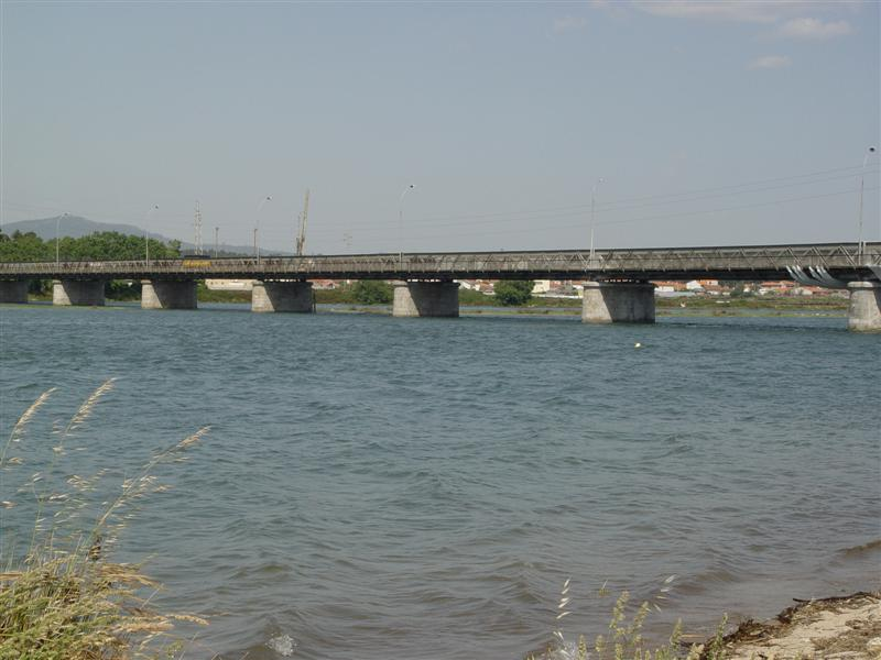 Fao Bridge, Esposende Portugal